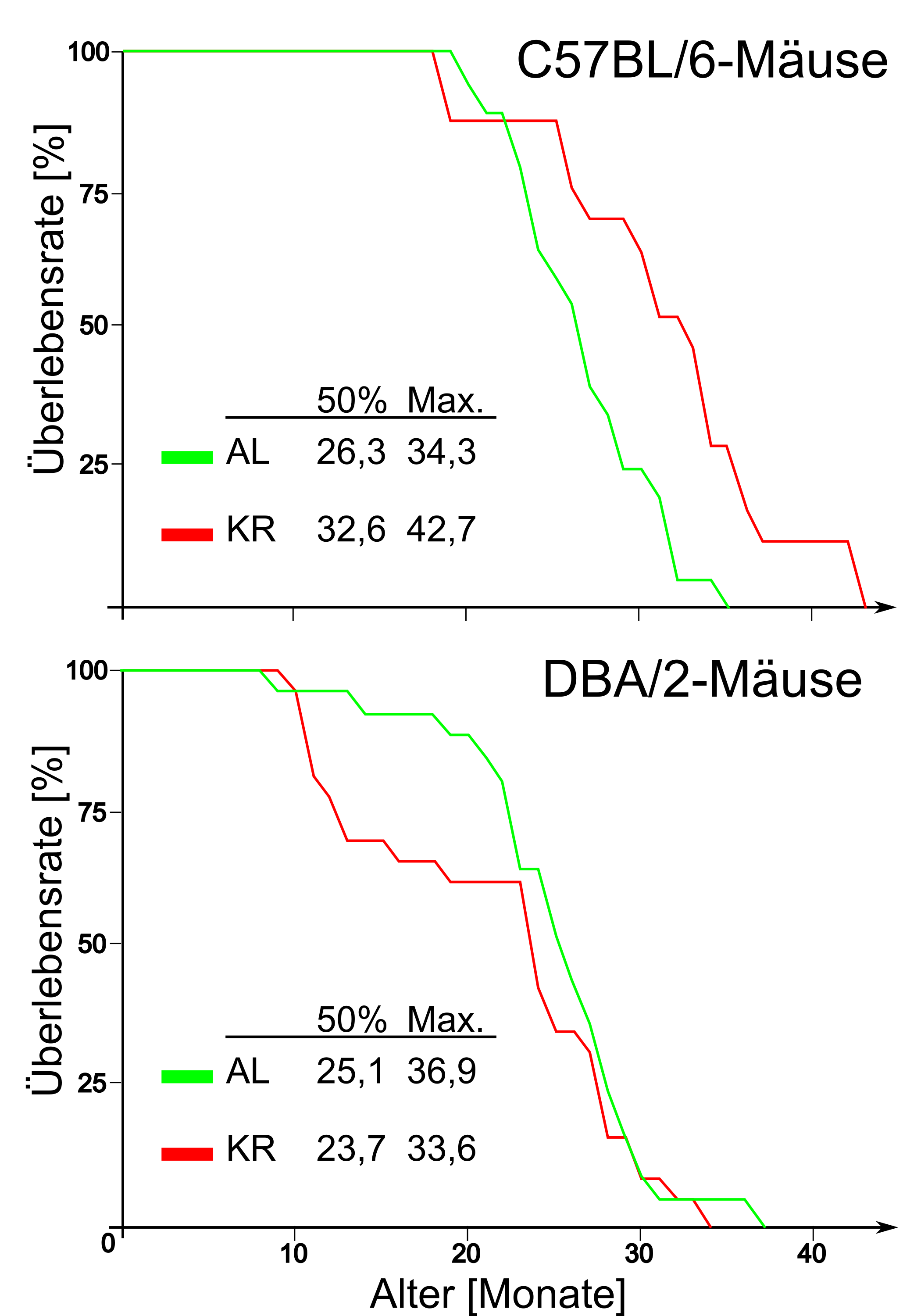 Auswirkungen der Kalorienrestriktion auf verschiedene Stämme von Mäusen. Obere Grafik C57BL/6-Mäuse ("Labormäuse"), darunter DBA/2-Mäuse ("Wildtyp")